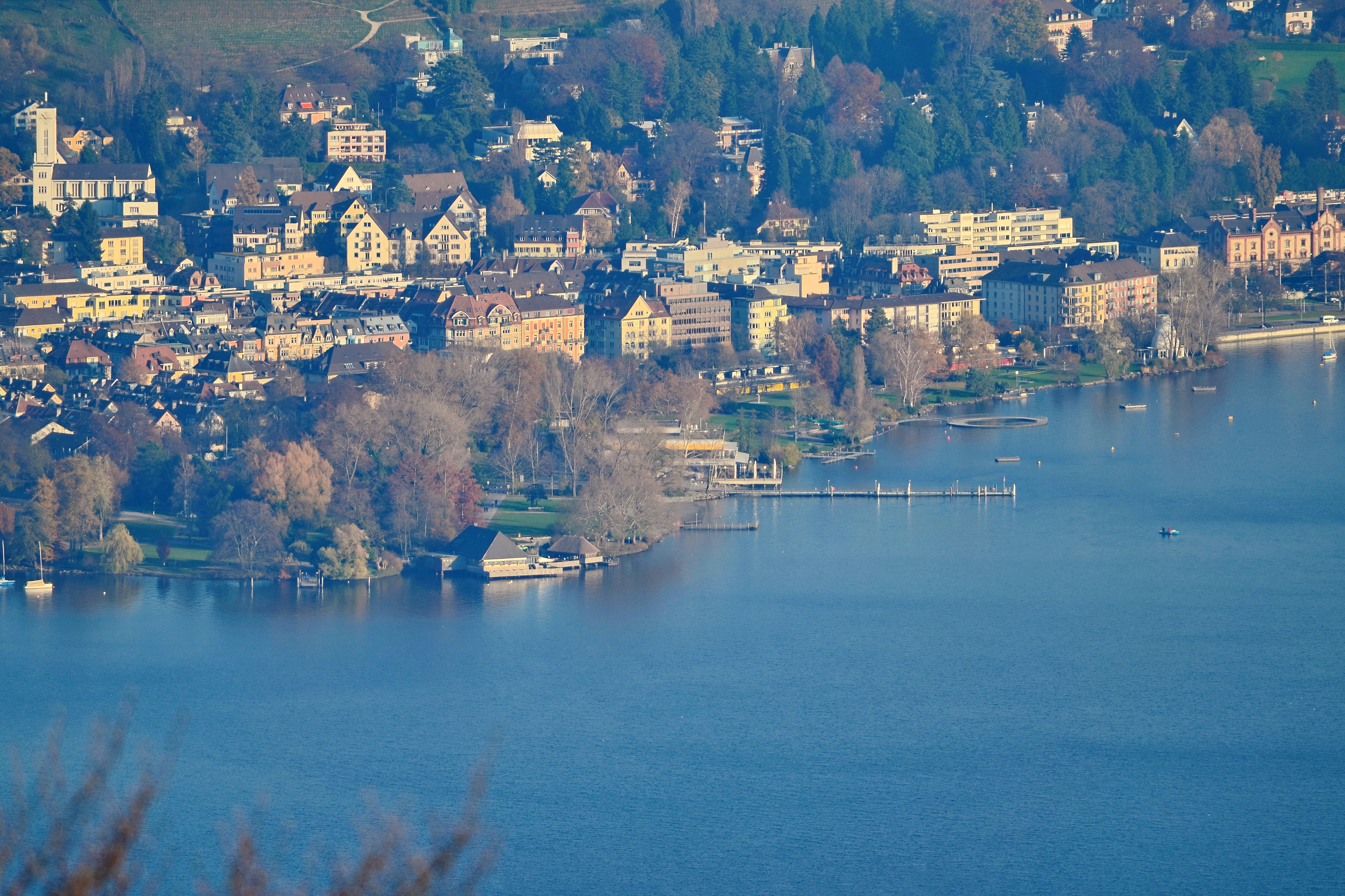 Strandbad Tiefenbrunnen at Zürichhorn in Zürich-Seefeld, Ansicht vom Uetliberg